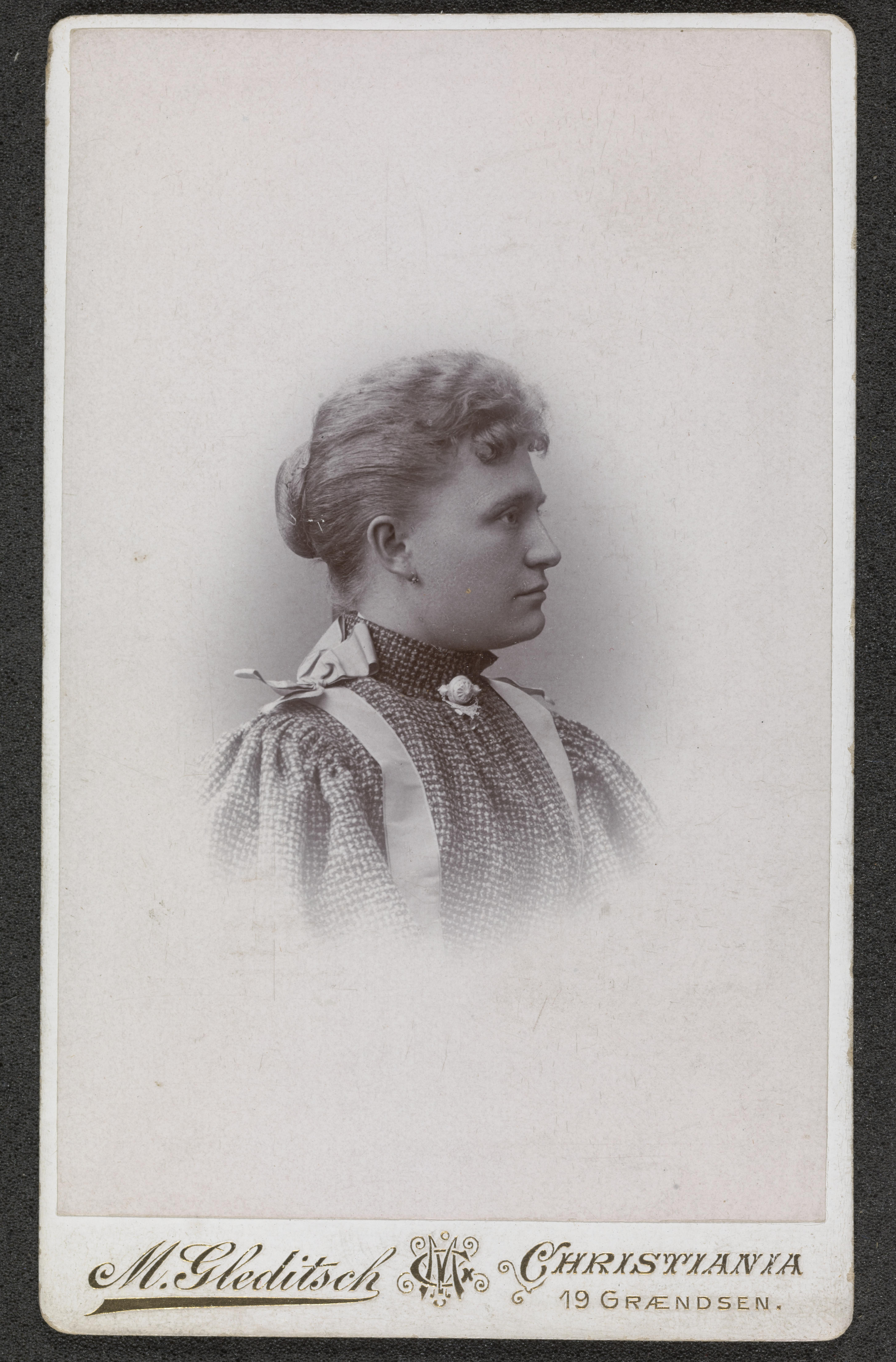 Bildet er hentet fra Nasjonalbibliotekets bildesamling